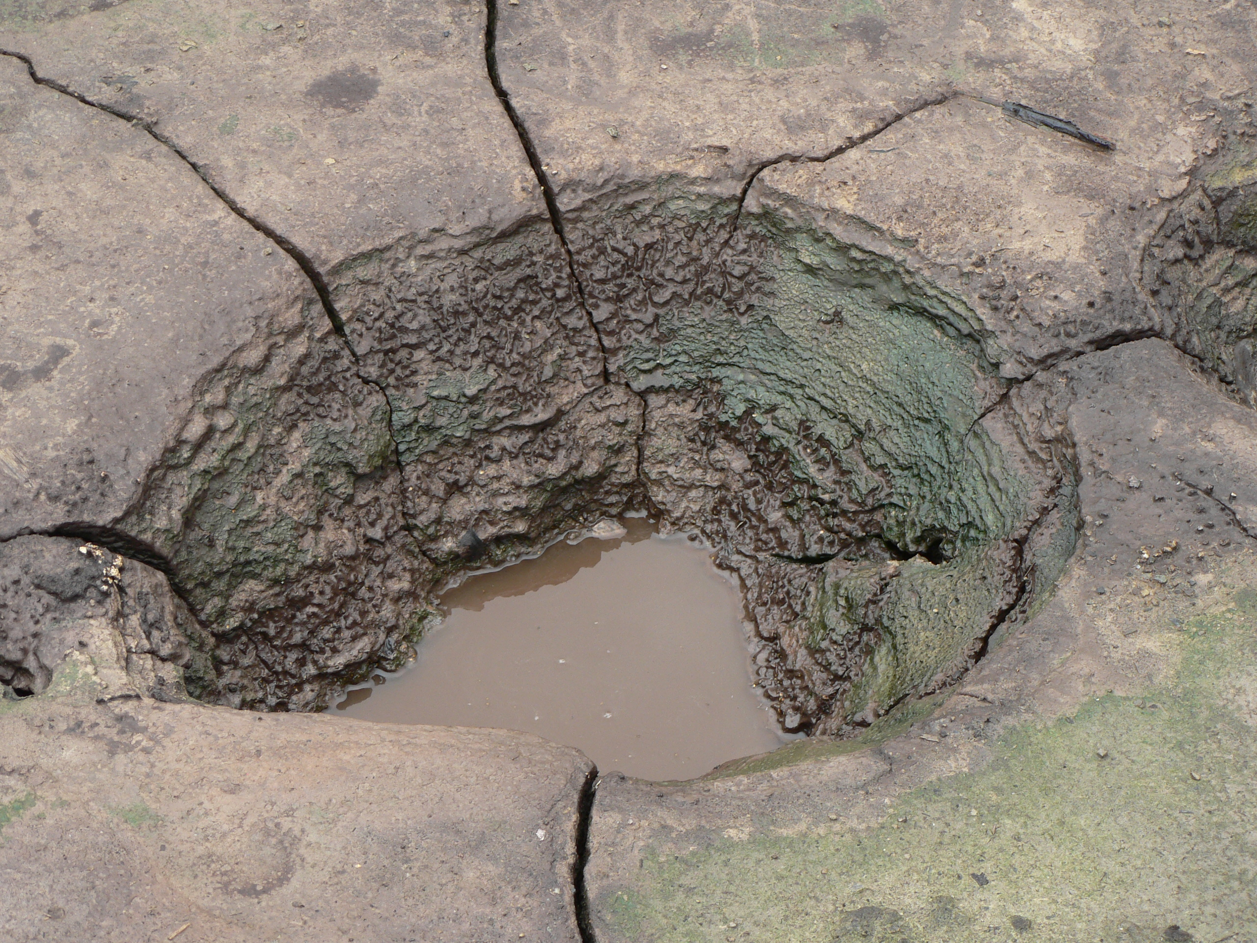 Mofeta v přírodní rezervaci SOOS